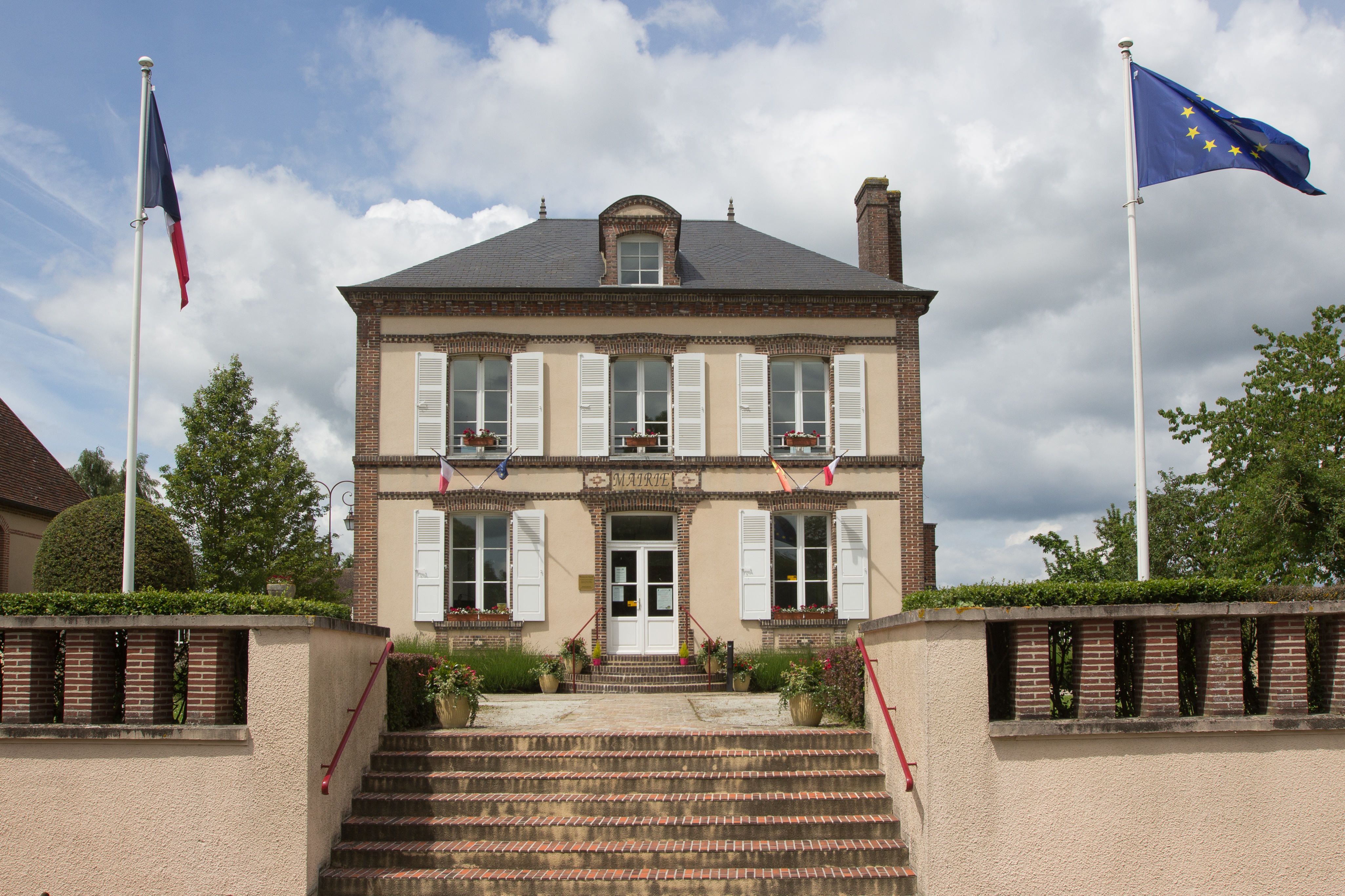 L'hôtel de ville des Barils (Eure, Normandie, France)